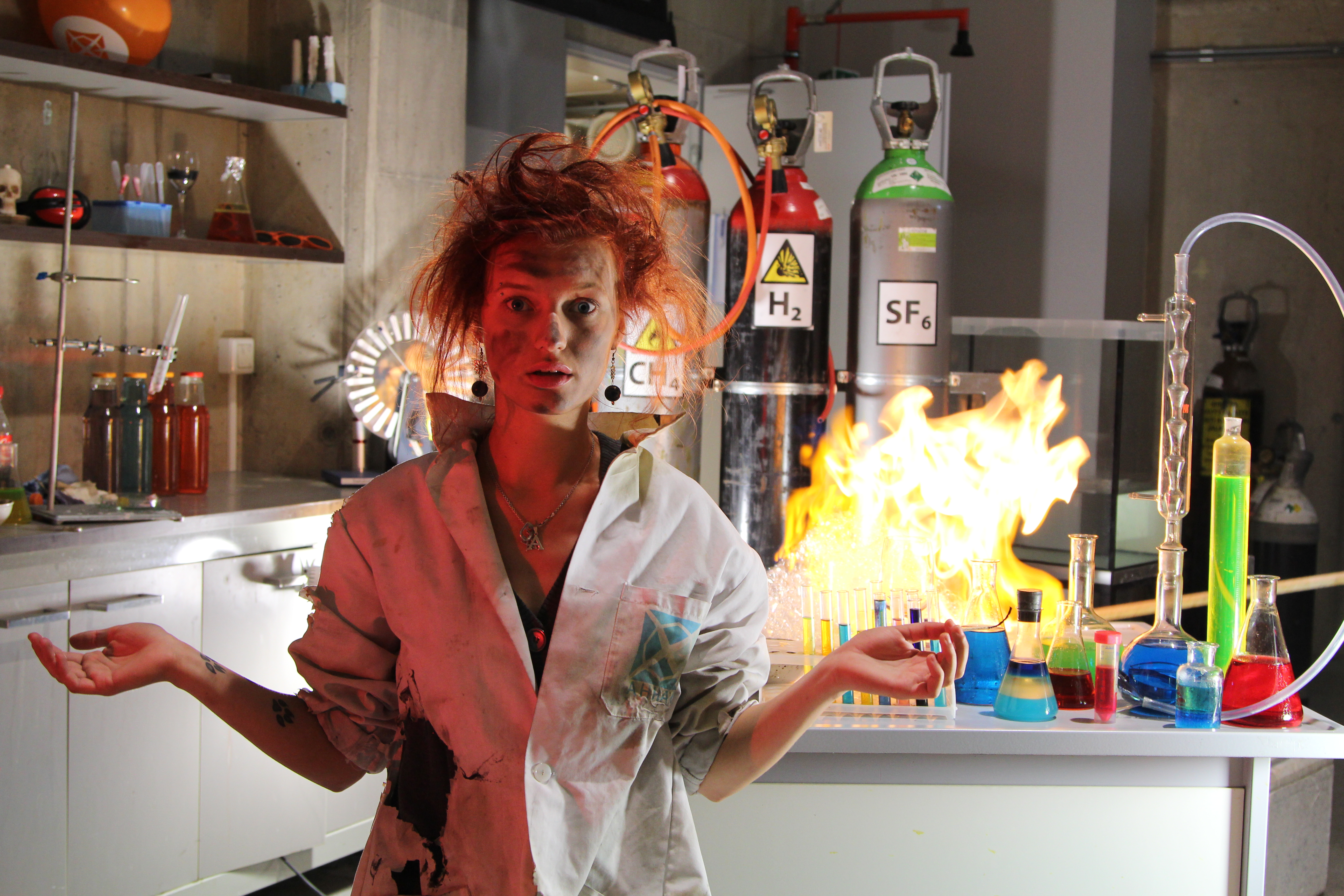 Ettevalmistused Teadlaste Öö festivaliks. Teadusteater - põlevad metaanimullid.